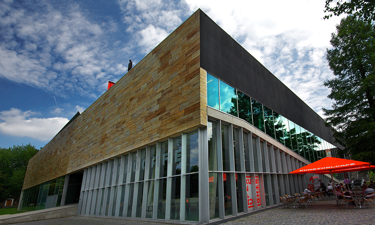 Kunsthal